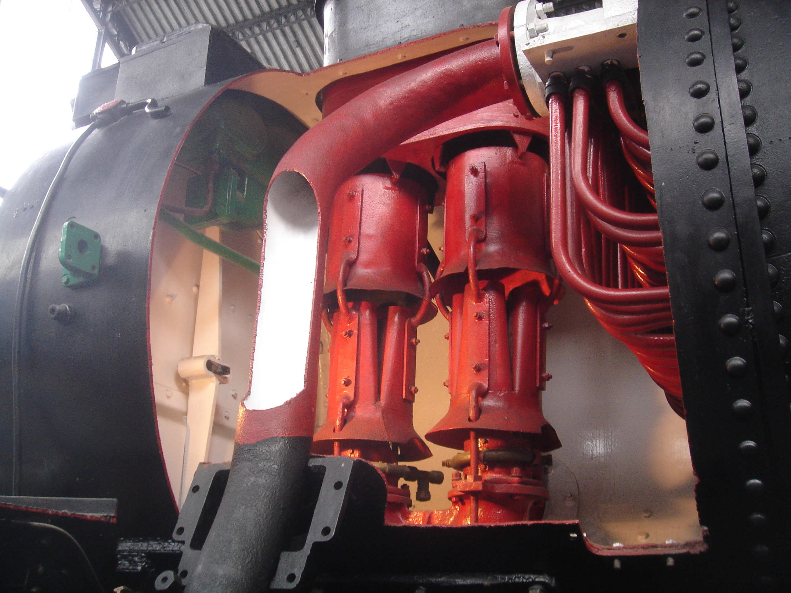 Rauchkammer mit Blasrohr der spanischen Dampflokomotive Renfe 141 F 2416. Das Foto der aufgeschnittenen Lokomotive wurde im Eisenbahnmuseum Madrid Delicias gemacht.